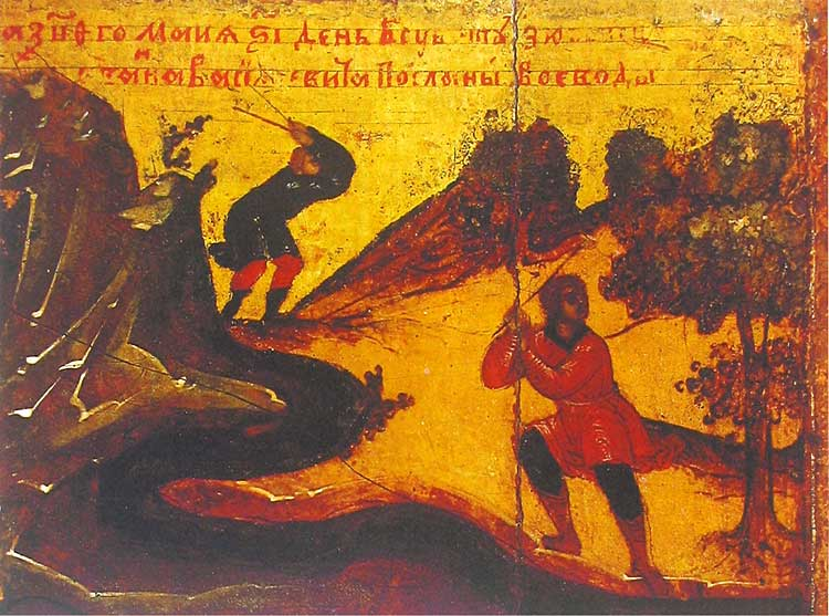 Построение Свияжска. Фрагмент иконы "Сергий Радонежский с житием", середина XVII века, Ярославль.